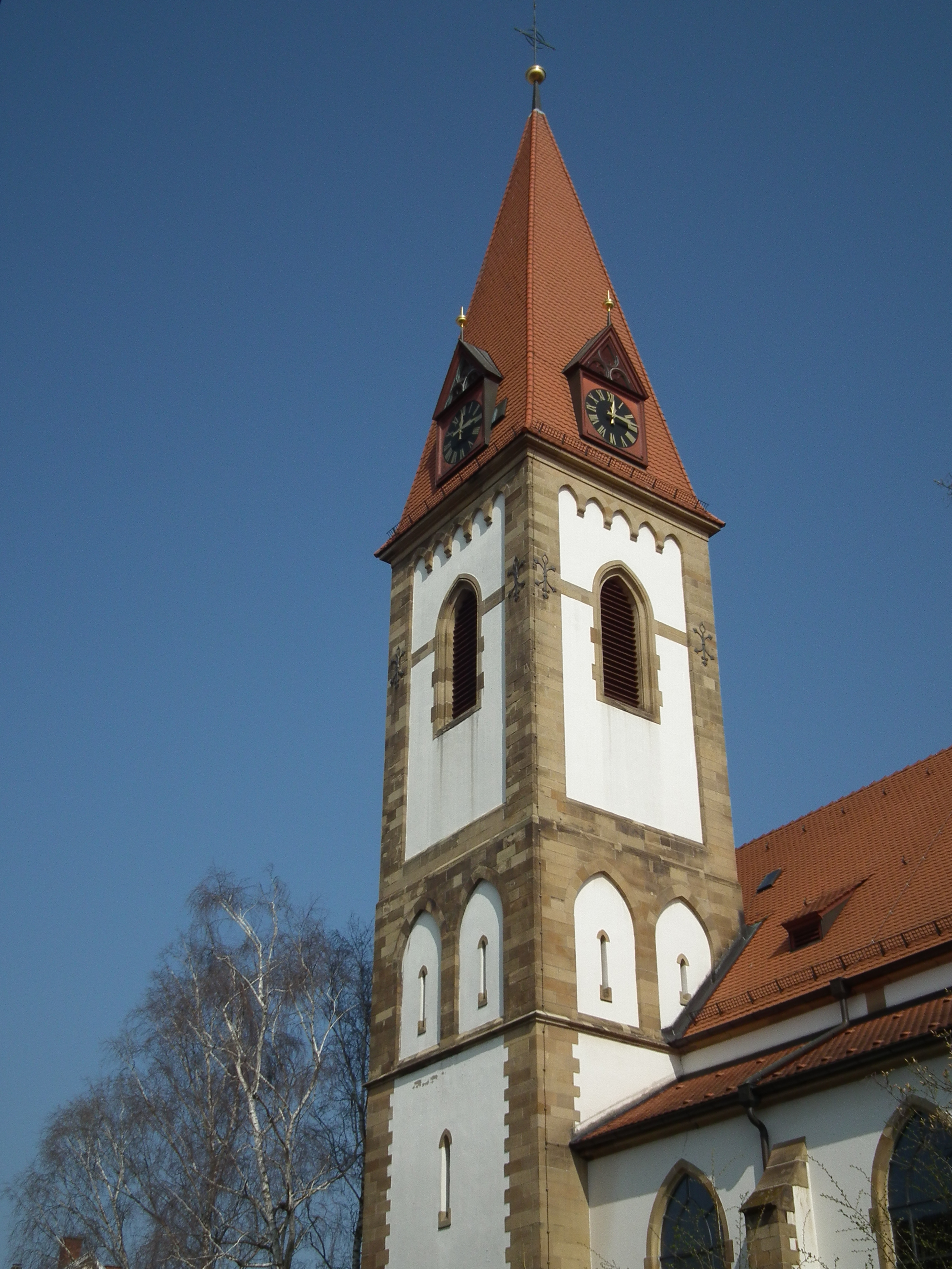 Turm der katholischen Kirche St. Kilian in Oftersheim (Baden-Württemberg, Deutschland)